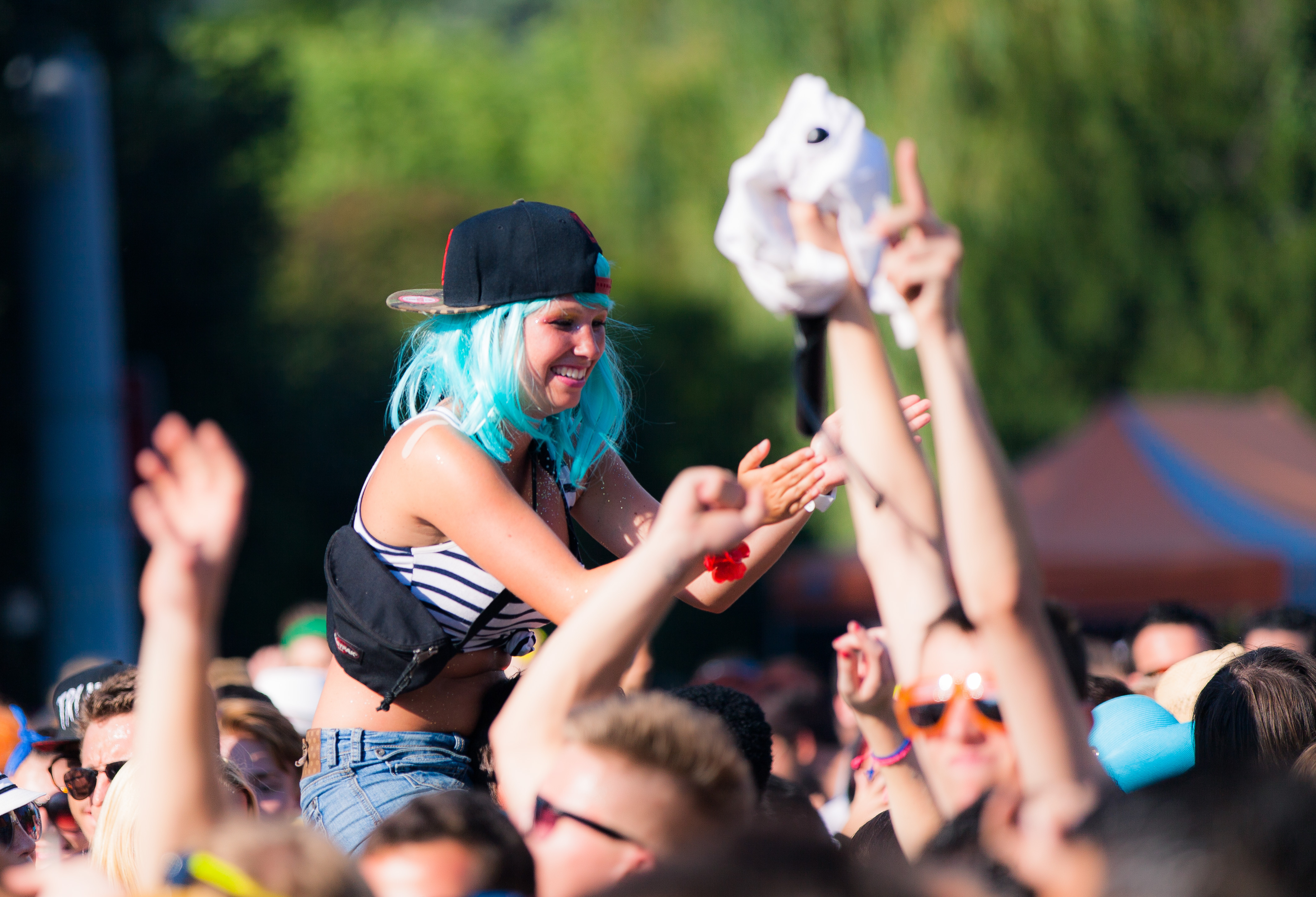 Zürich Street Parade 2013